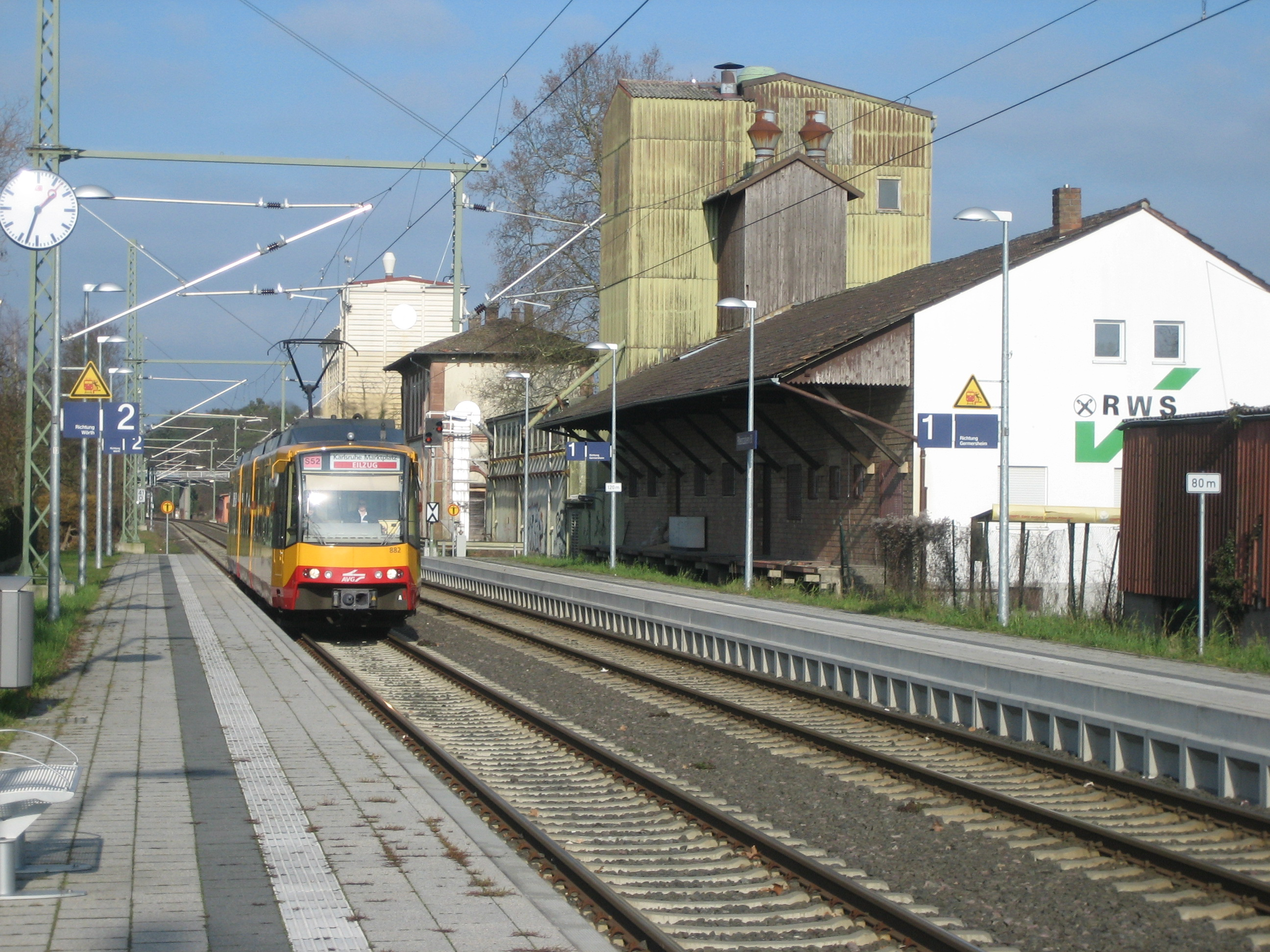 Stadtbahn bei der Einfahrt in den Bahnhof Rheinzabern